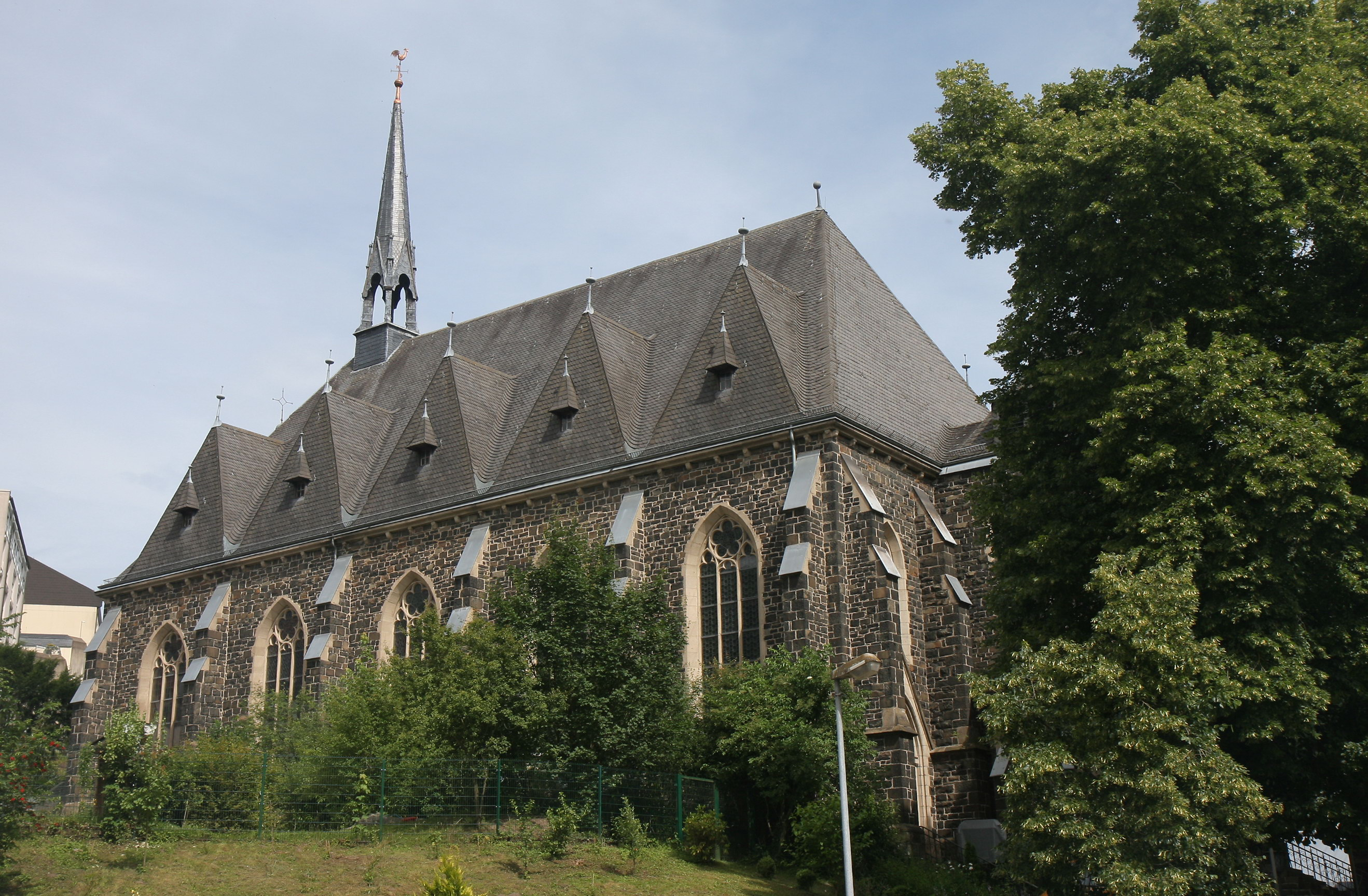 Katholische Pfarrkirche St. Matthäus in Altena, Lindenstraße. This image shows a heritage building in Germany, located in the North Rhine-Westphalian city Altena (no. xx).